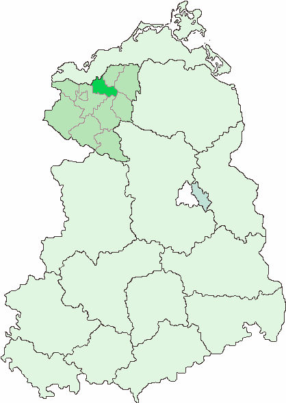 Lage des Kreises Sternberg im Bezirk Schwerin, Skizze freihand erstellt Rauenstein 20:06, 5. Sep 2006 (CEST)